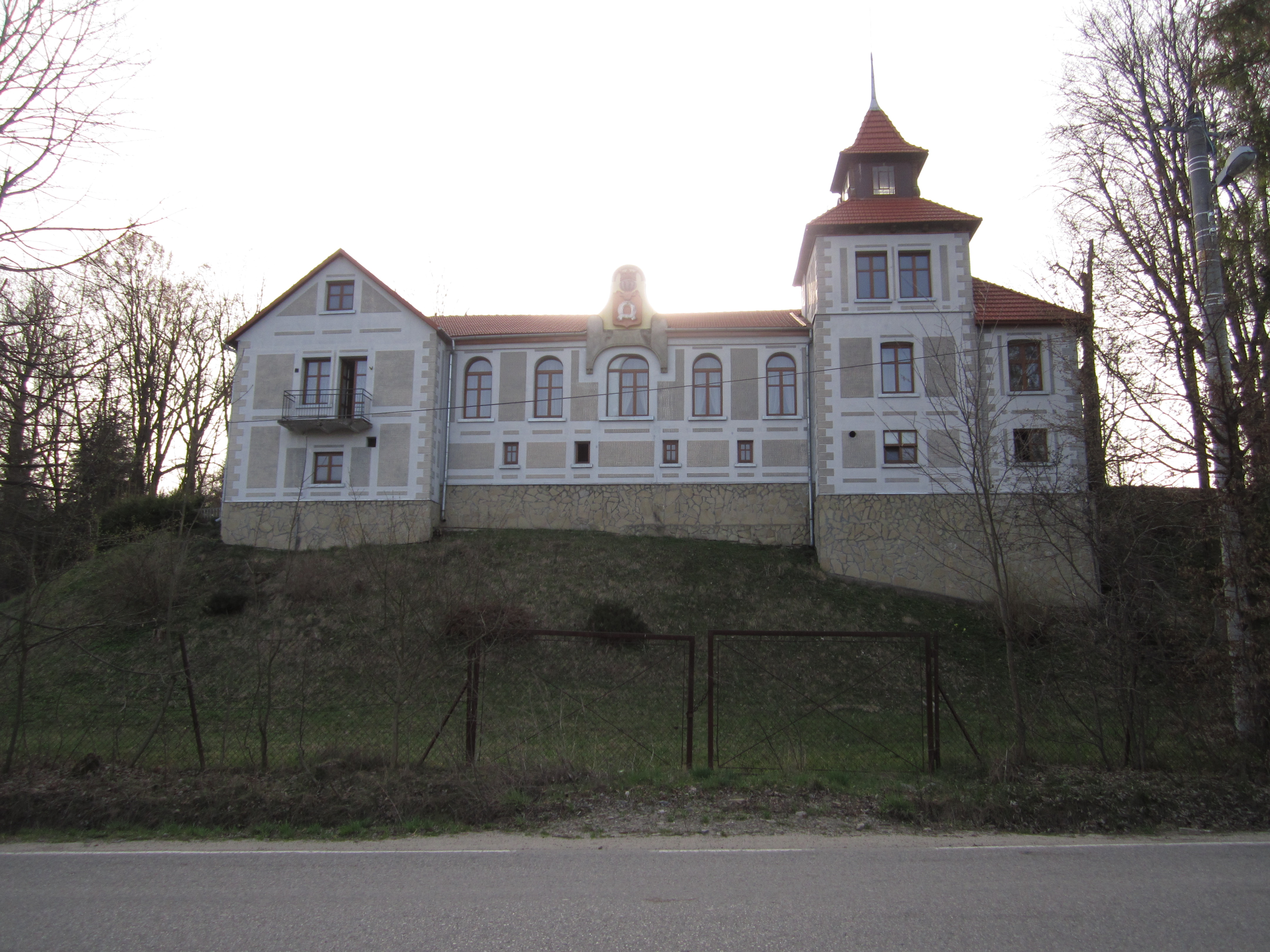 Zdjęcie przedstawia dwór Żuk-Skarszewskich od frontu